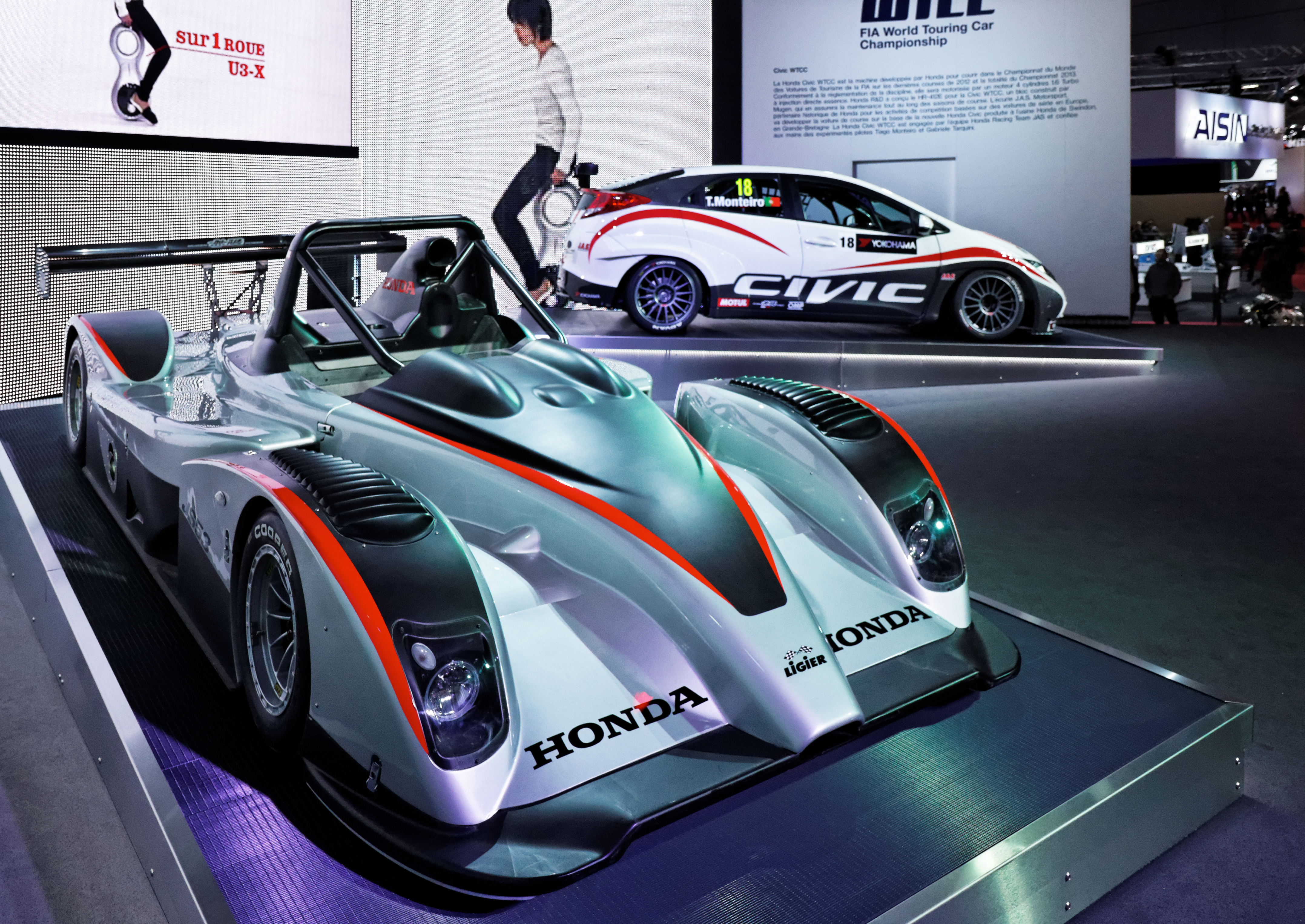 une Ligier-Martini JS53 présentée lors du Mondial de l'automobile de Paris 2012.